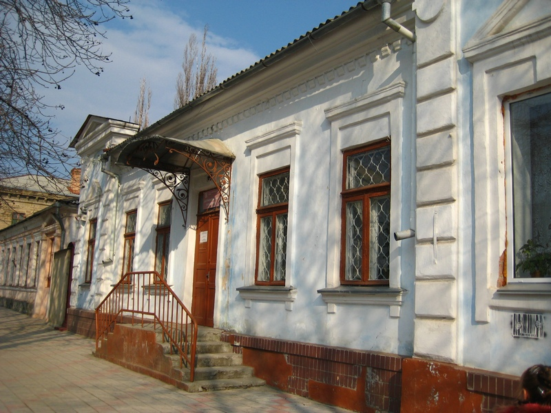 Бывший дом Элика Абрамовича